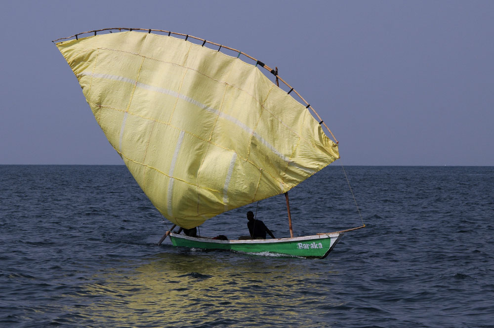 Pêcheurs dans la région de Nkove (lac Tanganyika).